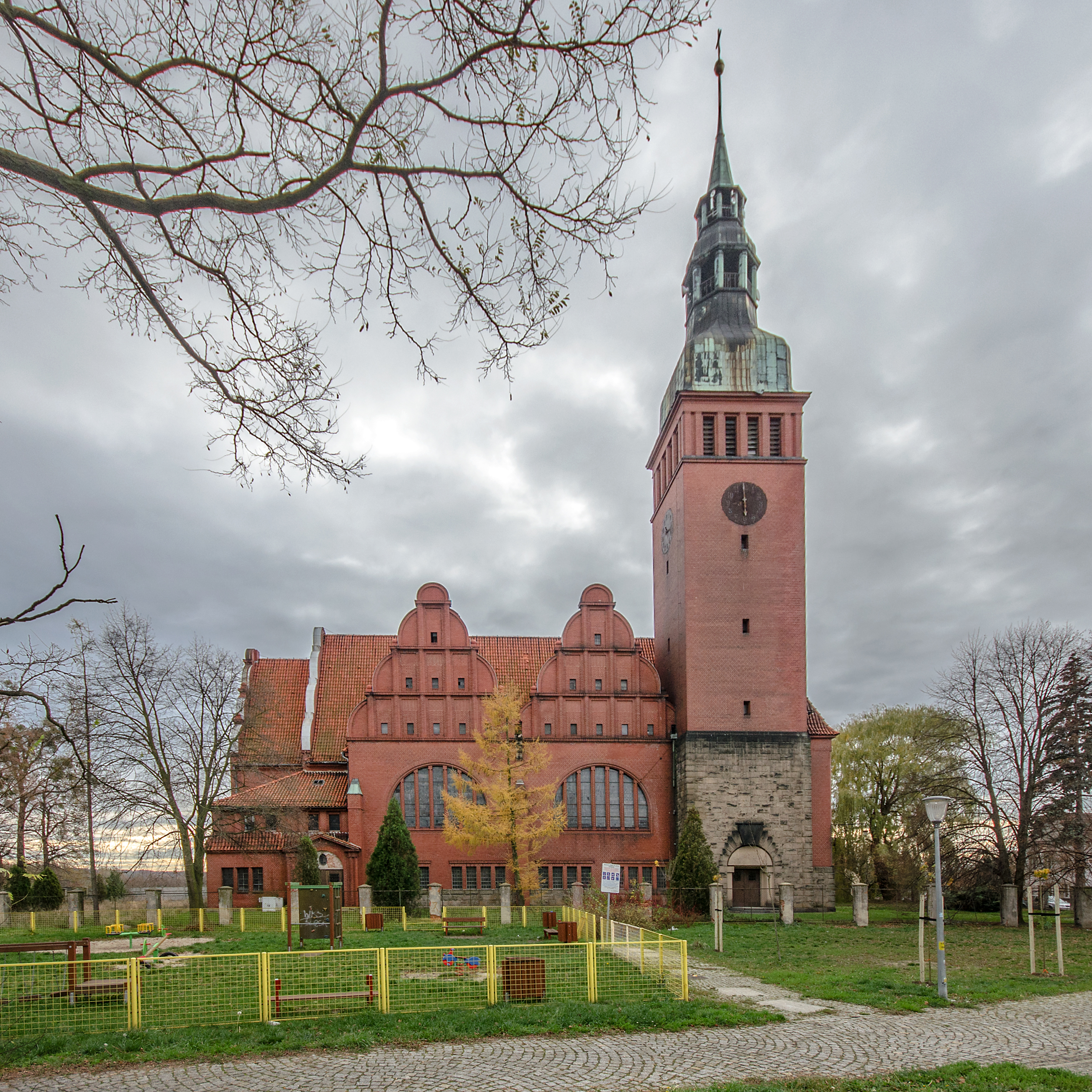 Prusice, kościół ewang., ob. rzym-kat. pom. p.w. św. Józefa, 1910-1911